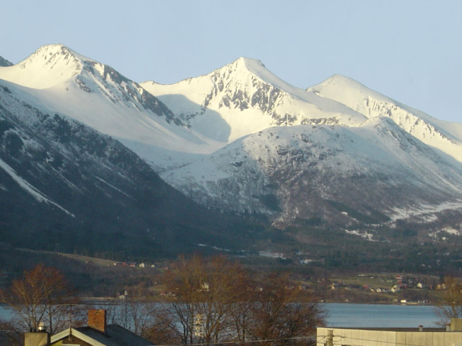 Rauma and the mountains from left: Skarven, Kirketaket and Kjøvskartind.